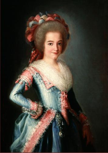 Probably María Fernanda Fitz-James-Stuart y Stolberg-Gedern (1775-1852)